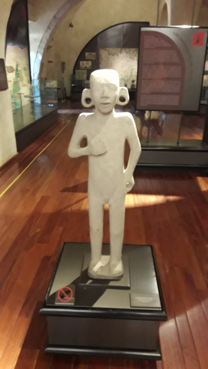 Replica de una figura huasteca que se encuentra en el Museo Regional de la ciudad de Querétaro, México.